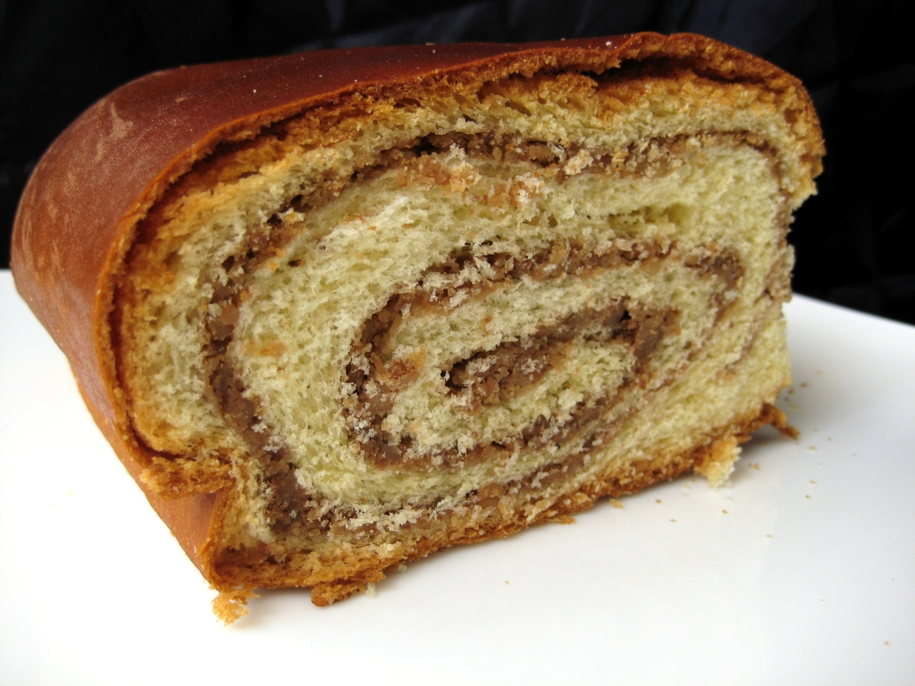 Orahnjača